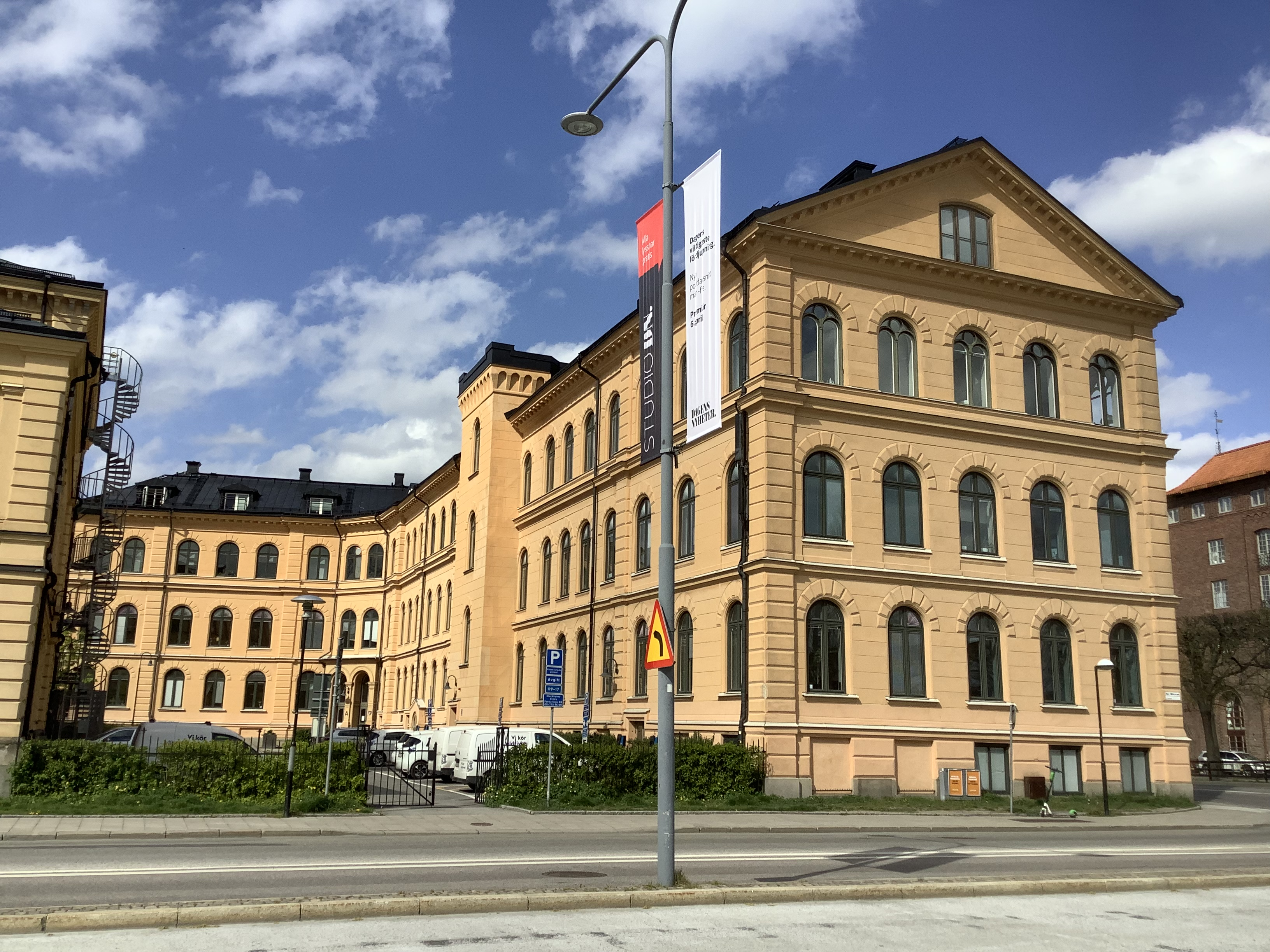 Gamla Karolinska Institutet, Kungsholmen, Glasbruket 3, hus 1, 1882-1885, arkitekt okänd